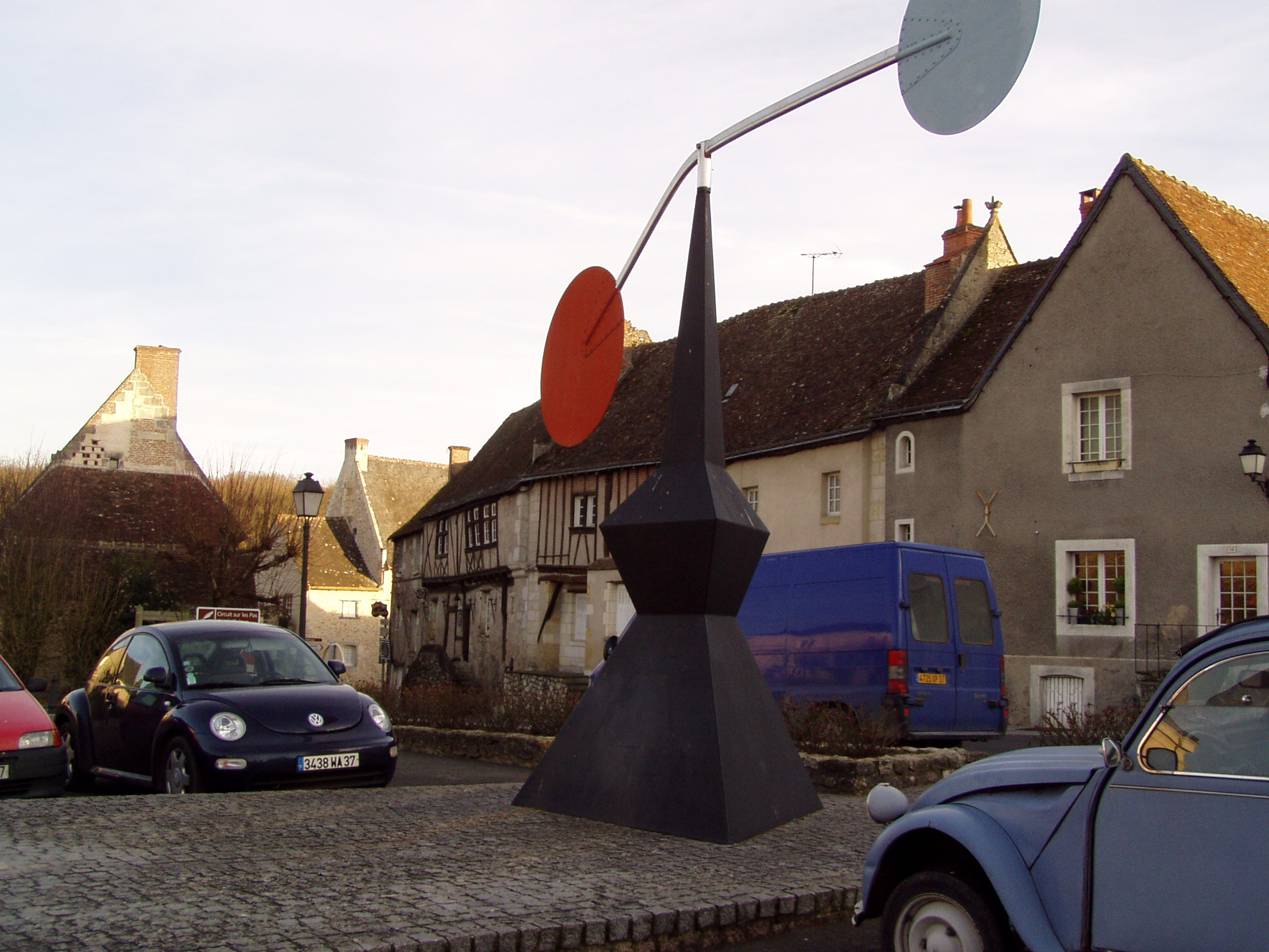 Un mobile du sculpteur Alexender Calder sur la place de Saché commune d'Indre-et-Loire (France)